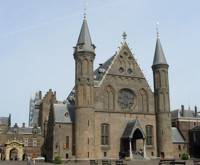 De Ridderzaal in het Binnenhof te Den Haag. Foto gemaakt en ter beschikking gesteld voor vrij gebruik door Gebruiker:Ellywa.